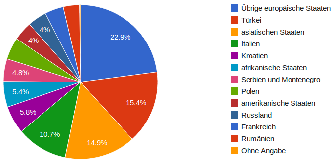 Aufteilung der meldepflichtigen Ausländer in Karlsruhe. Stand: 2009